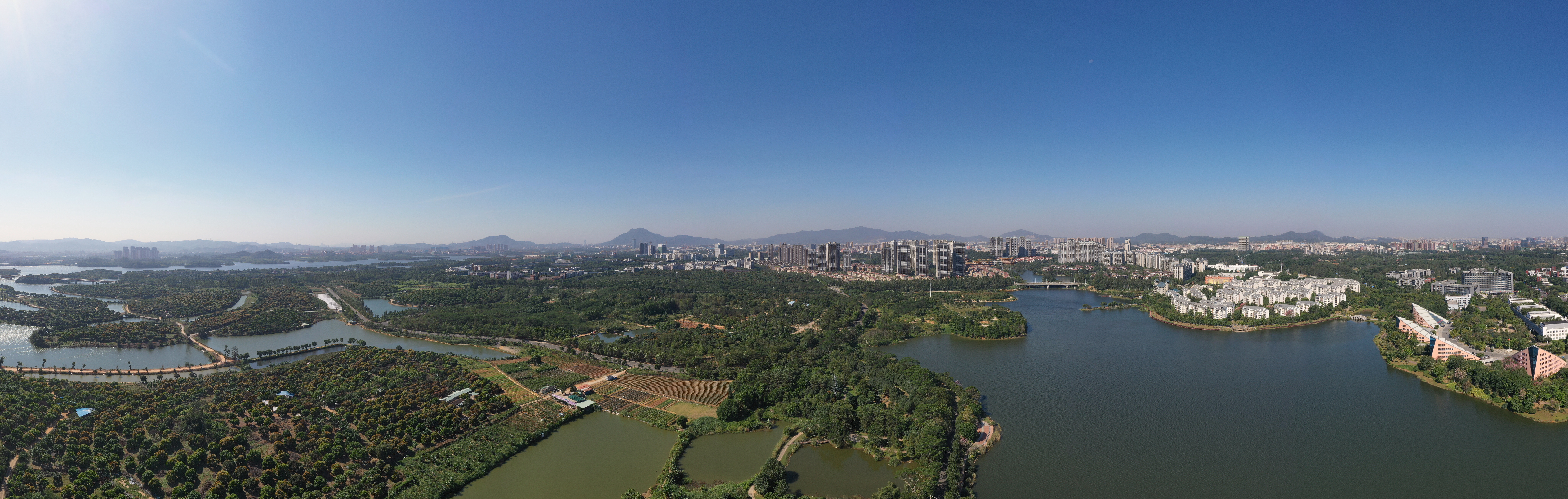 default